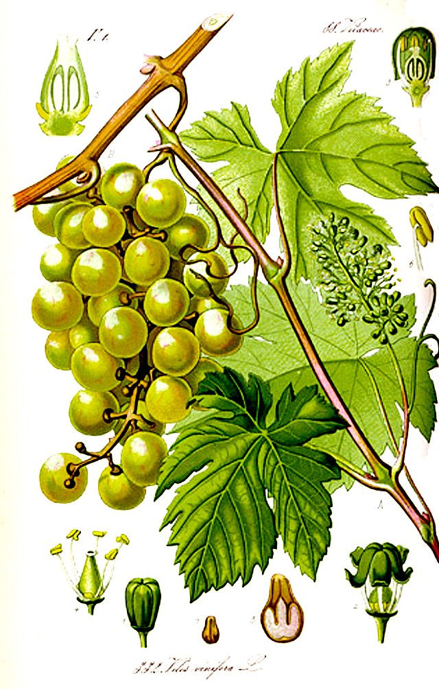 Raisin et feuille de vigne 1909 par Kreyder pour l'Ampélographie Viala et Vermorel